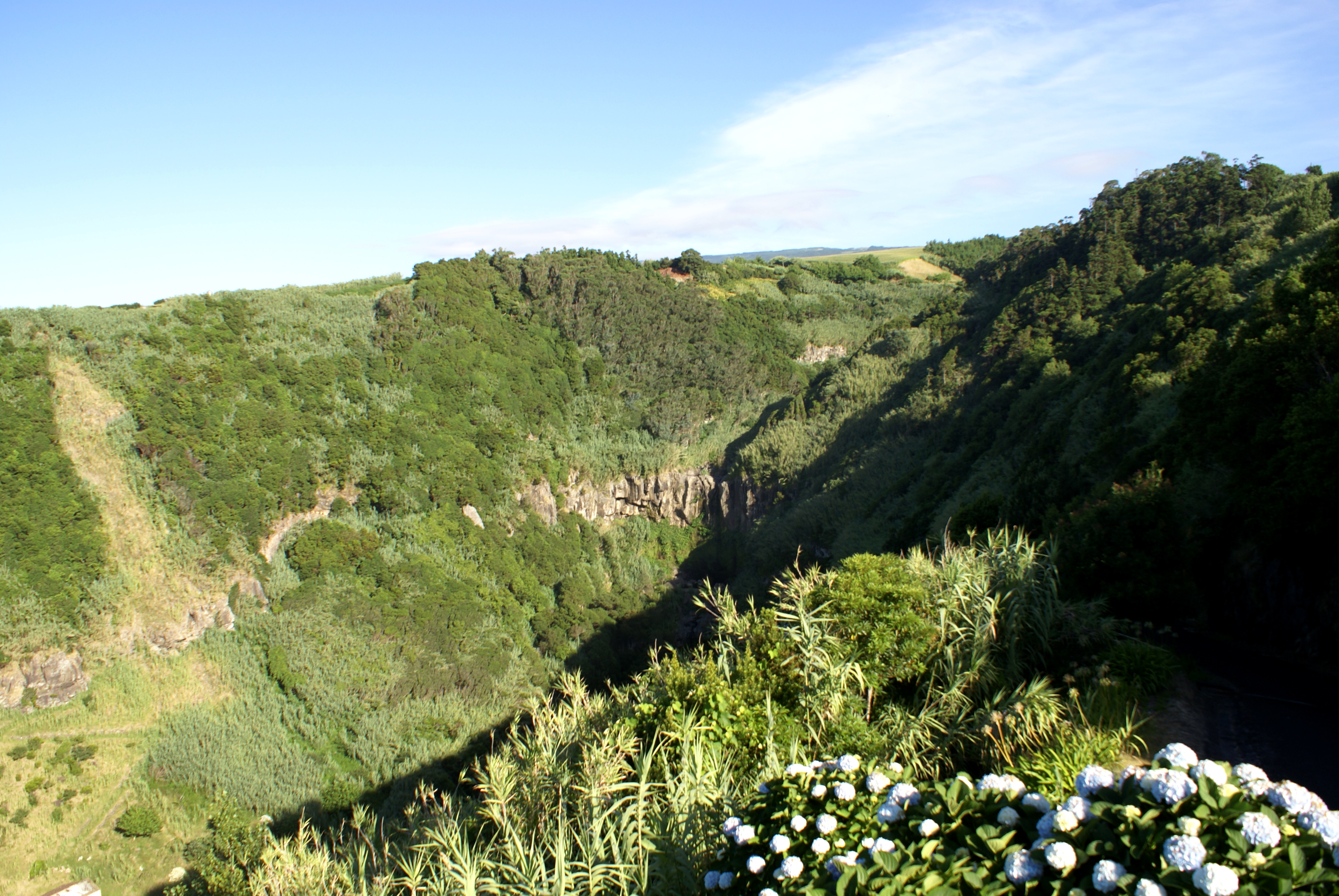 Miradouro do Salto da Farinha, Nordeste, ilha de São Miguel, Açores